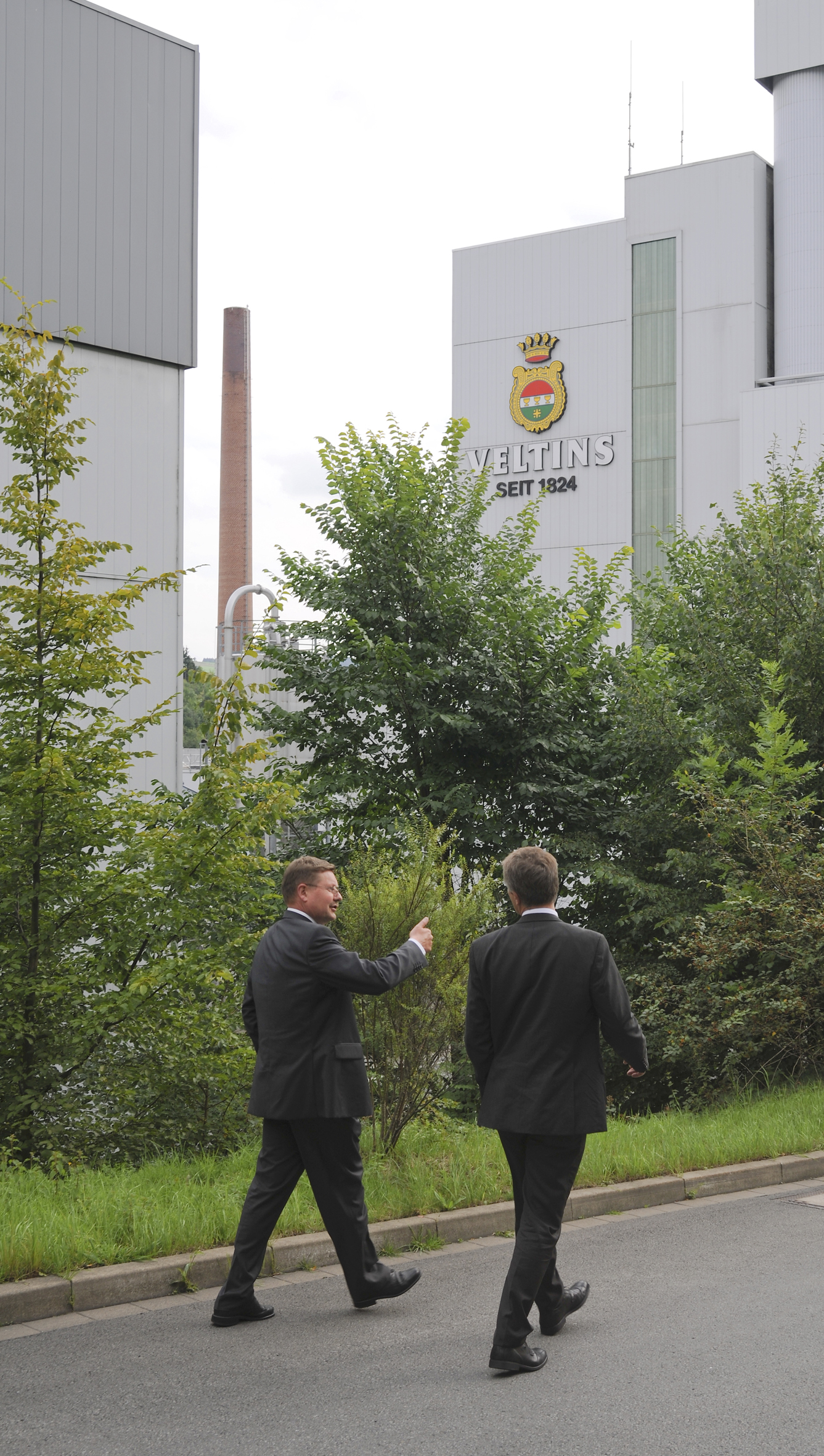 Energieeffizienz bei Veltins Klimaschutzminister Johannes Remmel hat auf der vierte Etappe seiner Klimaschutztour am 10. August 2011 drei Unternehmen besucht, die besonders energieeffizient arbeiten. „Klimaschutz und wirtschaftliches Denken gehört zusammen. Wer Energie spart, entlastet seine Ausgabeseite. Klimaschutz ist somit keine Umwelt- und Naturromantik, sondern pure ökonomische Vernunft“, sagte Minister Remmel. Die Unternehmen Dralon (Dormagen), Busch-Jaeger Elektro (Lüdenscheid) und die Brauerei C. & A. Veltins (Meschede) nehmen am Projekt Mod.EEM (Modulares Energieeffizienzmodell) der EnergieAgentur.NRW teil. Bei diesem Pilotprojekt wird ein online-gestütztes Energiemanagementssystem entwickelt. Rund 100 Unternehmen aus NRW nehmen daran bereits teil. Weitere Informationen unter: Flickr tags: Brauerei; Veltins; Meschede; Lüdenscheid; Busch-Jaeger; Klimaschutztour; 2011; NRW; EANRW; Minister; Johannes Remmel; Klimaschutz; EnergieAgenturNRW; Energiewende; Energieeffizienz